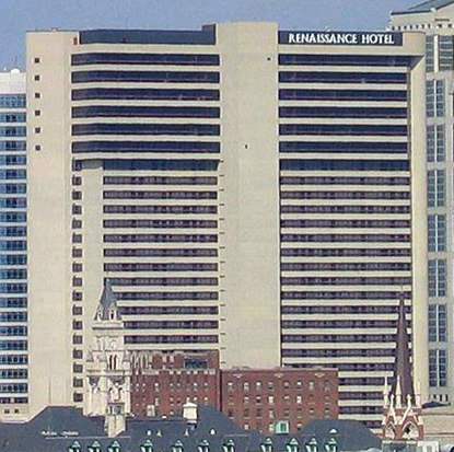 Renaissance Nashville Hotel